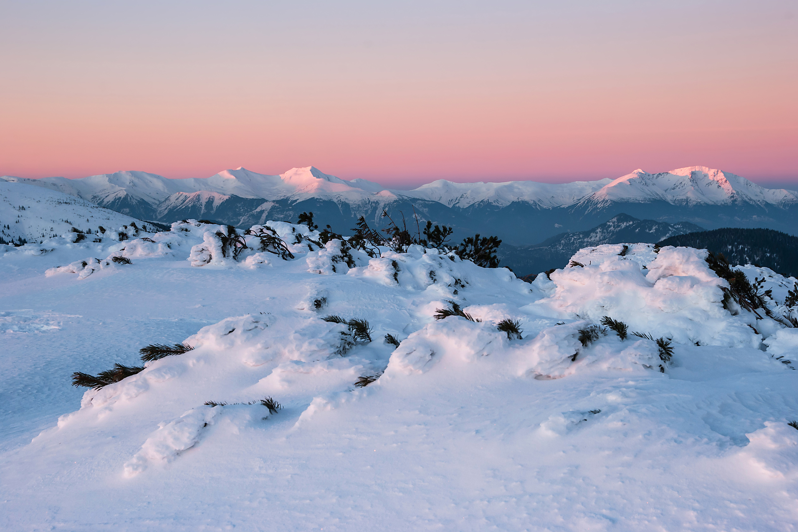 «Чивчино-Гринявський», Верховинський район, Чивчинське лісництво, кв. 11, 13-16, 24, 26-42; Буркутське лісництво, кв. 14-19, 23-25, 32-35; Паркалабське лісництво, кв. 8, 9, 14, 16-20. Полонини: «алузька», «Прелуки», «Ретундул», «Лустун», «Мале Пір'є», «Попадя», «Гнітеса», «Чивчин», «Штевйора»